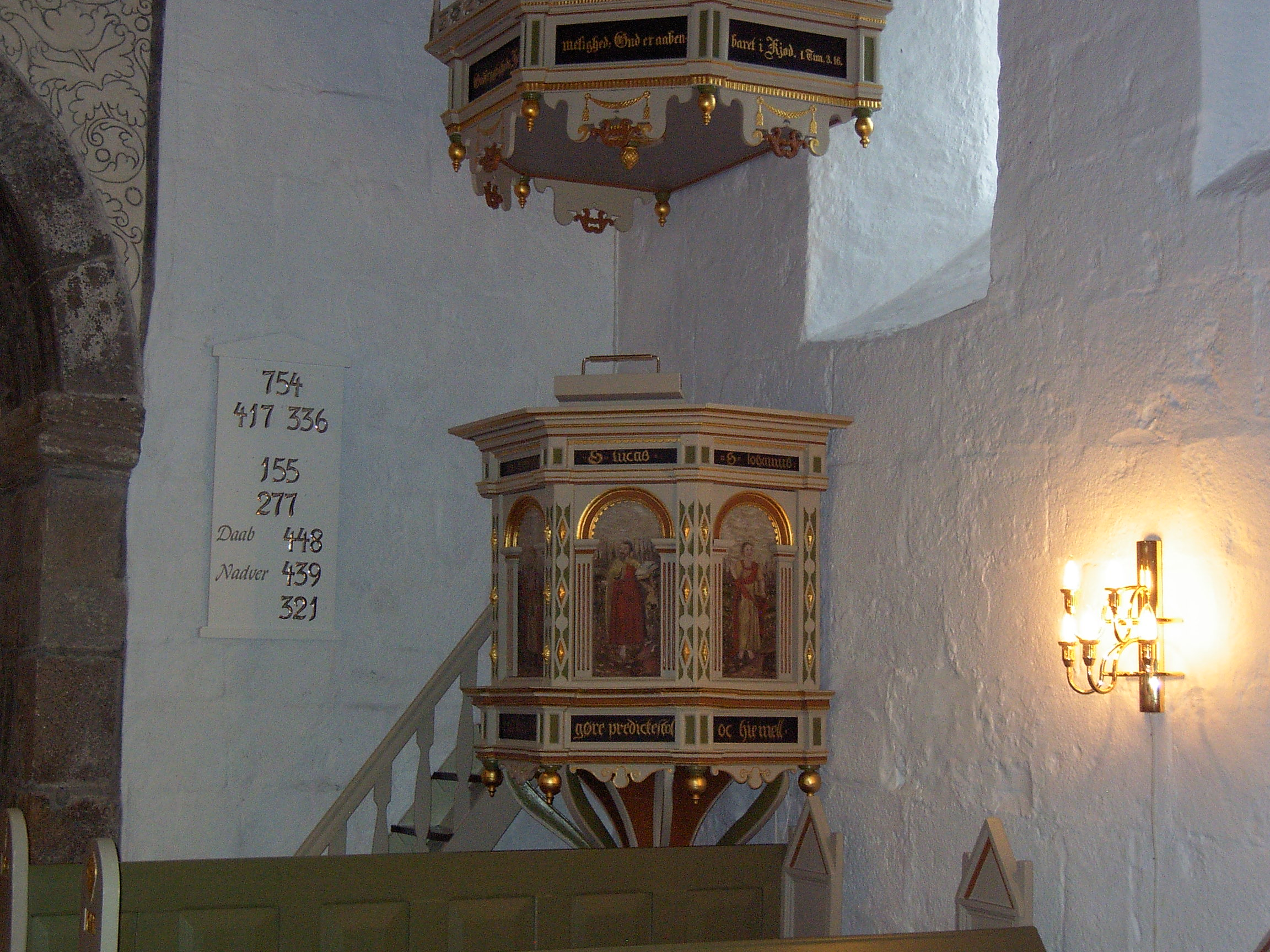 Prædikestolen i Hover kirke